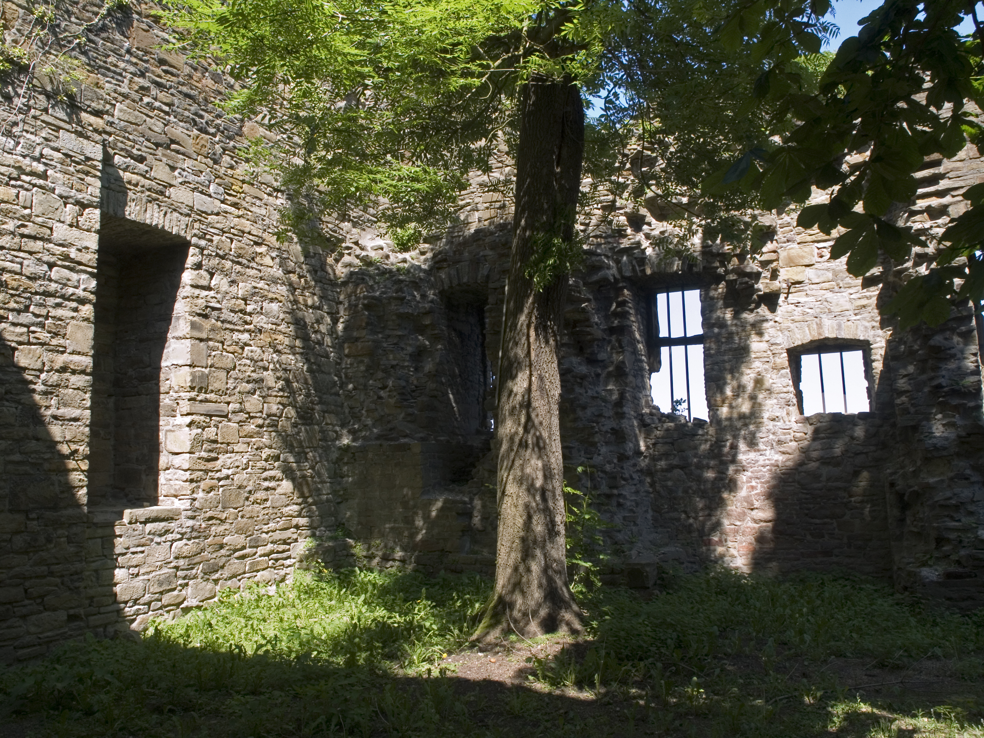 Северный Рейн - Вестфалия, Веттер (Рур) - крепость Бург Веттер